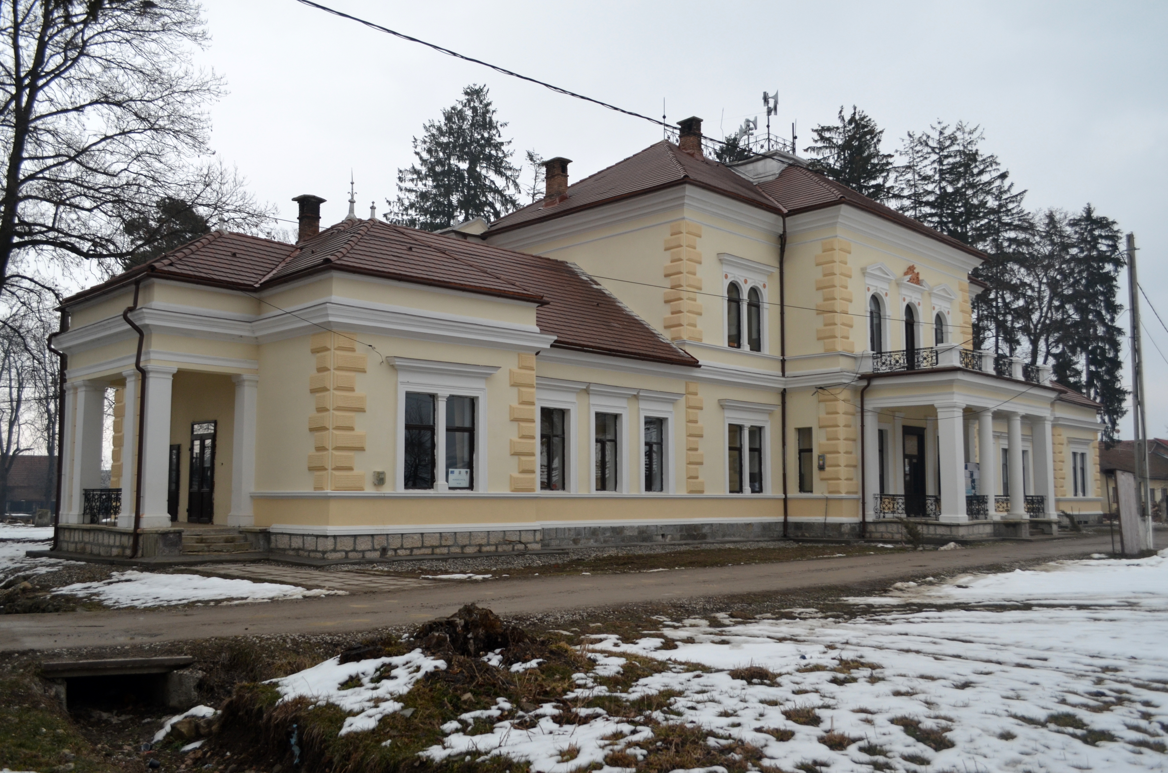 Castelul Beldy Ladislau, azi Primăria Budila - vedere dinspre est 01